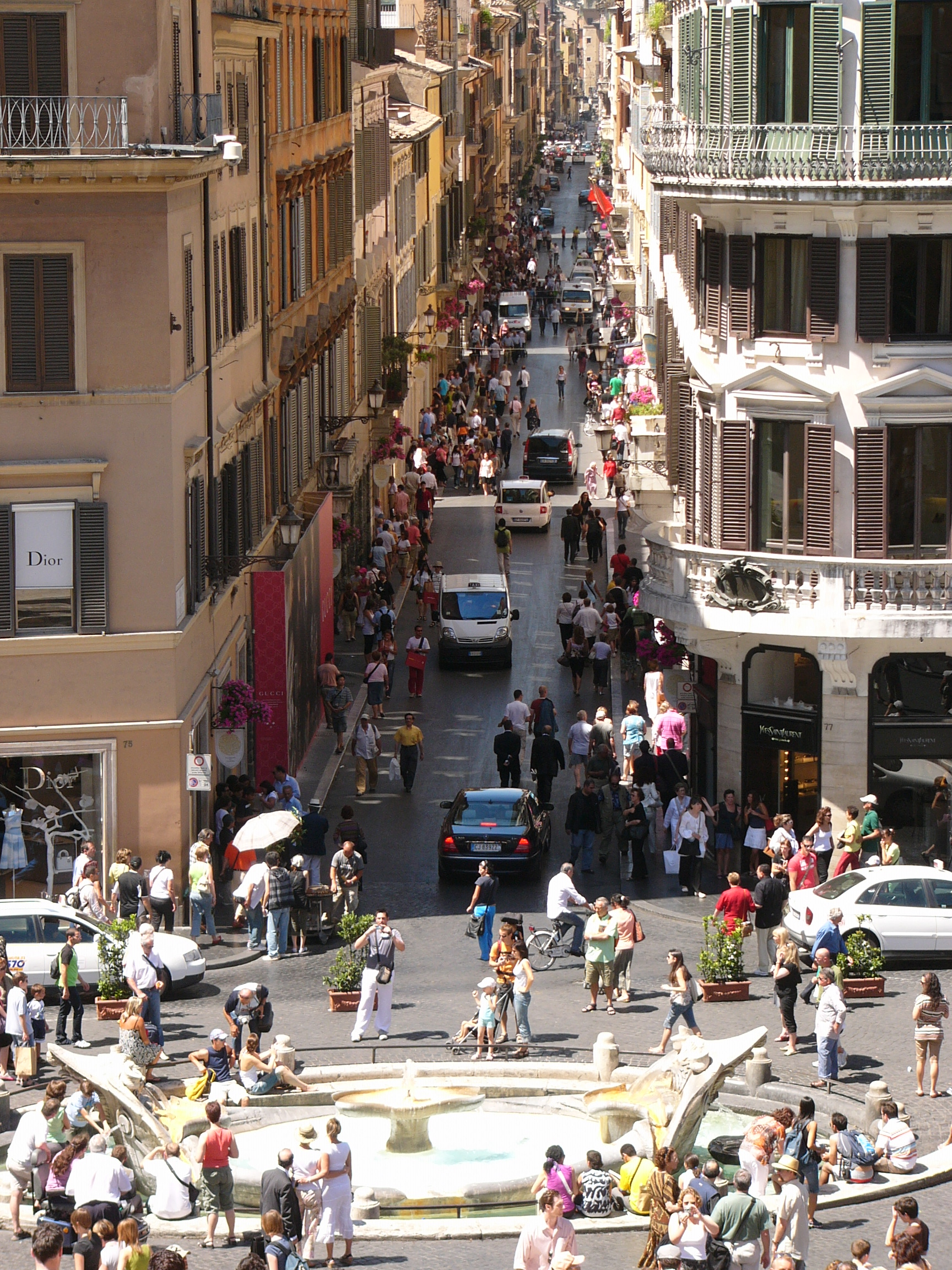 Roma, Via dei Condotti (Gucci shop is visible). Fontana della Barcaccia in the foreground.